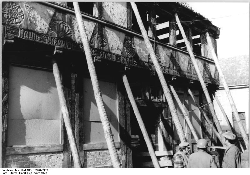 Quedlingburg, polnische Gastarbeiter, Restauration Für Bezieher des ADN-Reporterdienstes! Zum Beitrag: "Bis in die sagenumwobenen Winkel...-Bauleute besorgen Schönheitskur für 1 000jähriges Quedlinburg" ADN-ZB Sturm 26.3.76-nk Über 1.000 Jahre alt ist die Harzstadt Quedlinburg. Sie gehört zu den weltbekannten Denkmälern mittelalterlicher Baukunst. In der Schmalen Straße 13, einem Fachwerkhaus aus dem Jahre 1592 haben polnische Spezialisten mit den komplizierten Rekonstruktionsarbeiten begonnen. (Bitte beachten Sie hierzu auch R0326-300 und 301n sowie 303 bis 305N)